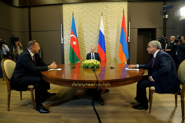 Встреча с Президентом Азербайджана Ильхамом Алиевым (слева) и Президентом Армении Сержем Саргсяном